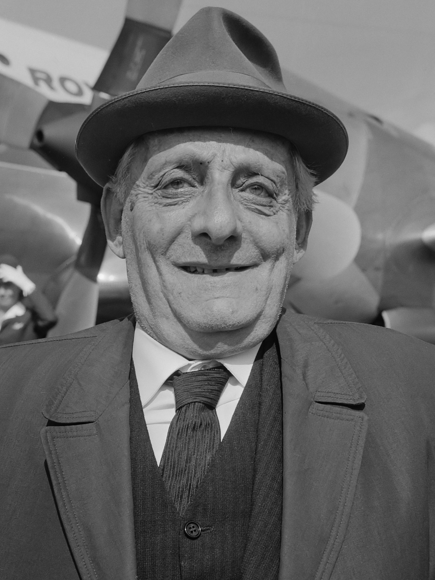 Aankomst Max Brod (schrijver) op Schiphol 9 september 1965